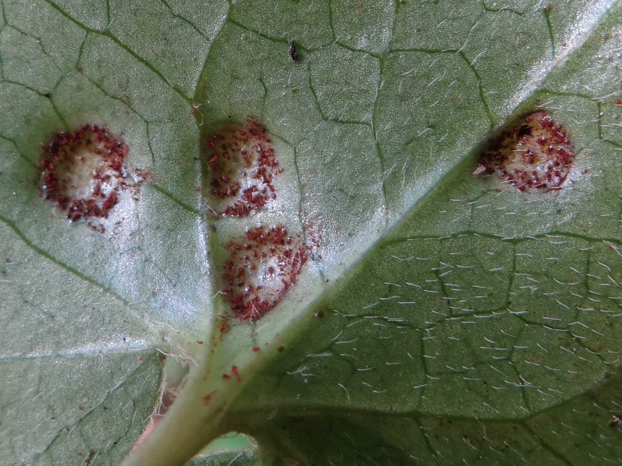 Puccinia asarina on Asarum europaeum (location: Slovakia, Słowacki Raj)